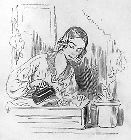 Grisette, Abbildung von Gavarni in Louis Huart, Physiologie de la grisette, Paris 1841